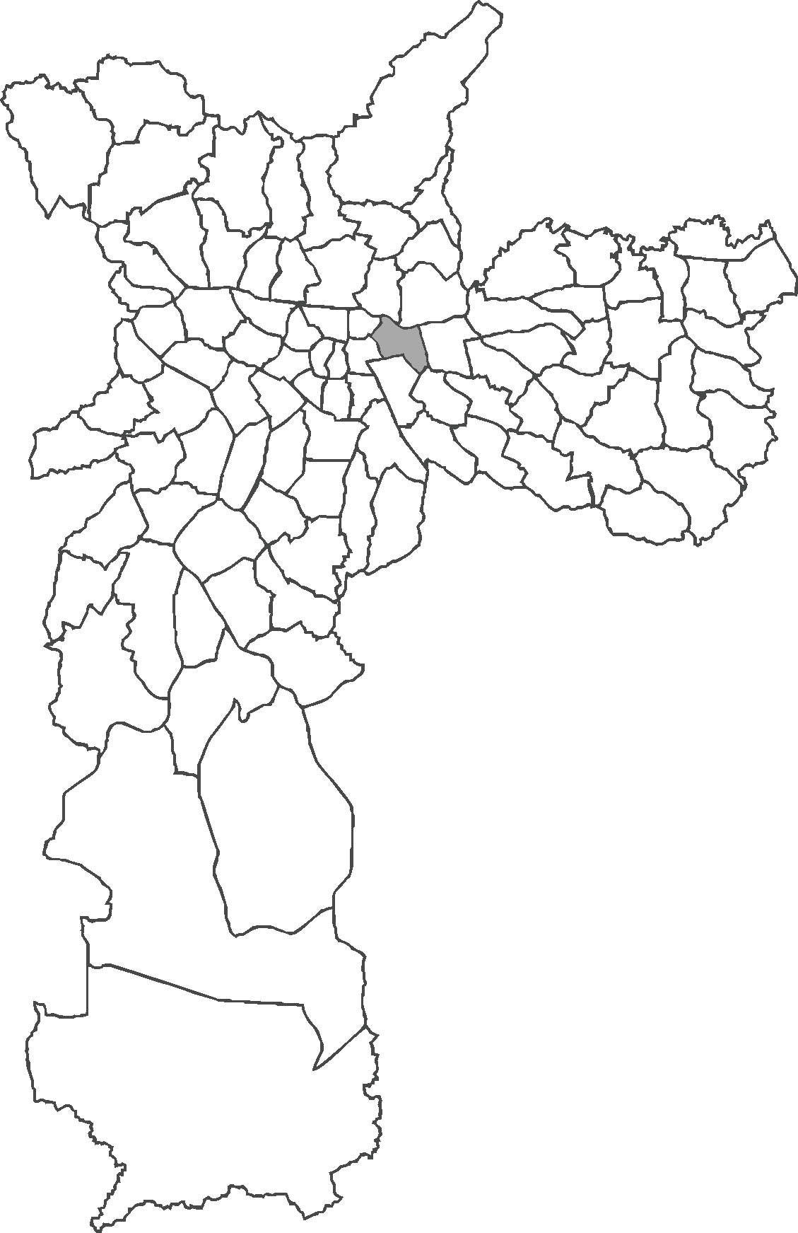 Localização do distrito de Belém no município de São Paulo.